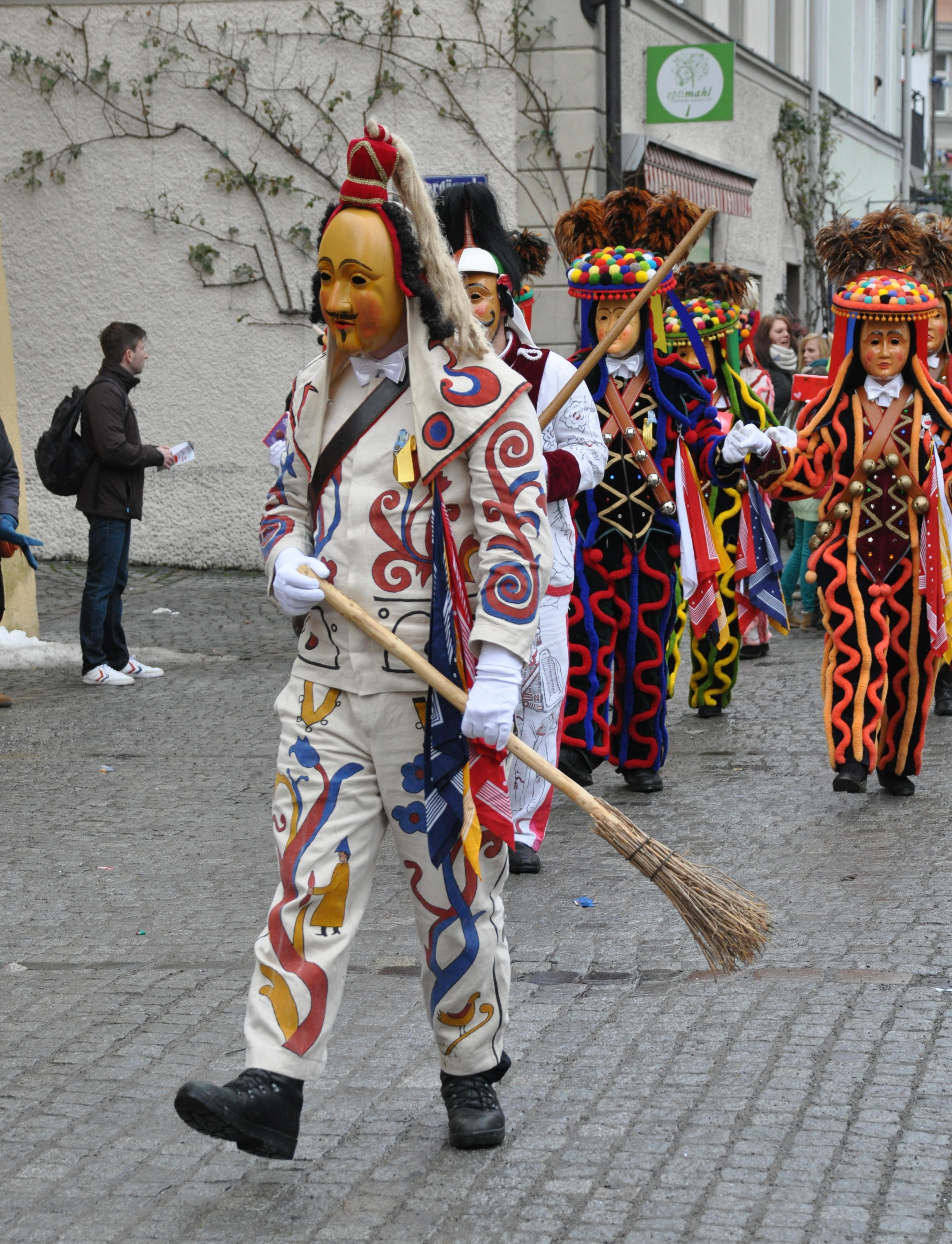 Narrenzunft Schömberg; Narrenfigur: Harzer (Einzelfigur) Fotografiert beim Großen Narrentreffen der Vereinigung Schwäbisch-Alemannischer Narrenzünfte (VSAN) in Lindau; Narrensprung am Sonntag, 24. Januar 2016.